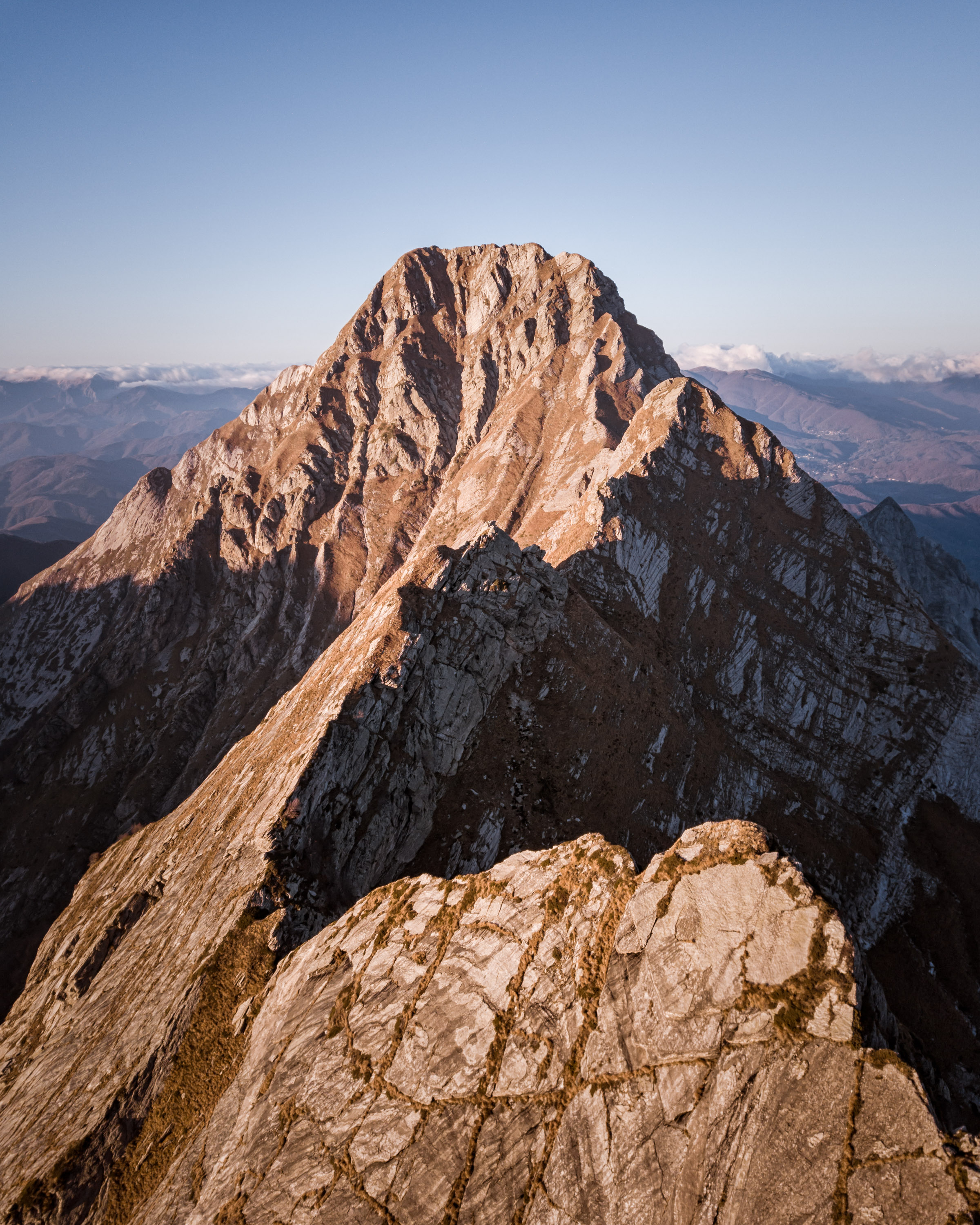 Monte Pisanino(Q1945906)